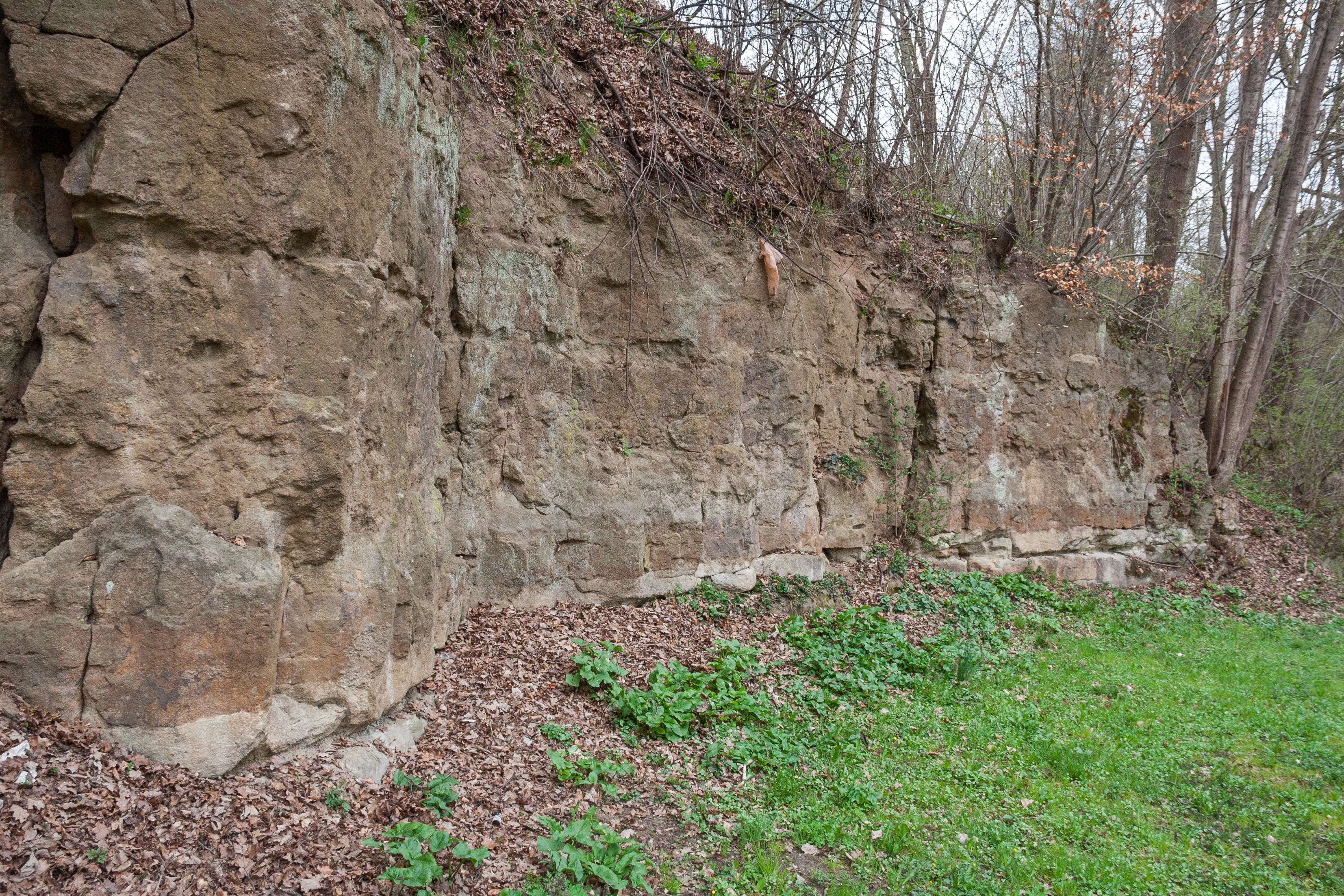 Burgthann, Strasseneinschnitt, Geotop